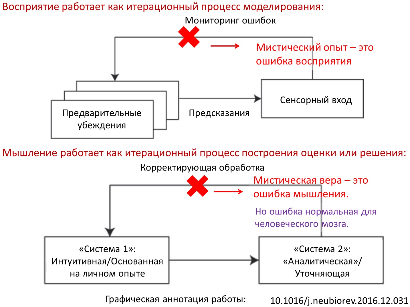 Нейро-когнитивные основы мистических верований. Графическая аннотация работы van Elk M., Aleman A. Brain mechanisms in religion and spirituality: An integrative predictive processing framework //Neuroscience & Biobehavioral Reviews. – 2017. – Т. 73. – С. 359-378.